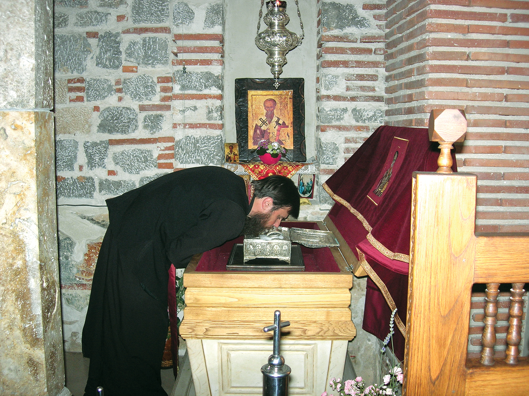 Plaošnik